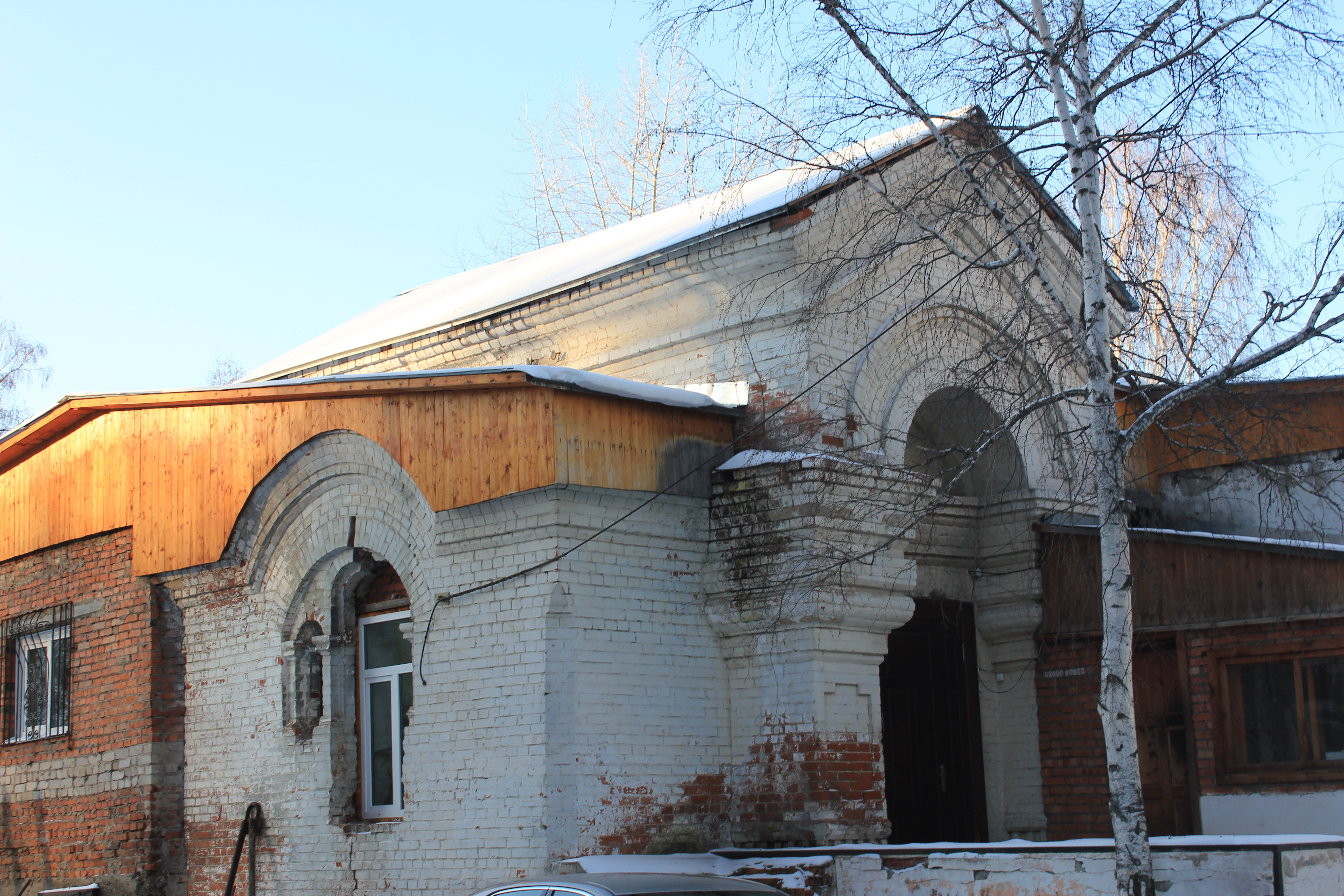 Каменная мемориальная часовня университетская роща ТГУ